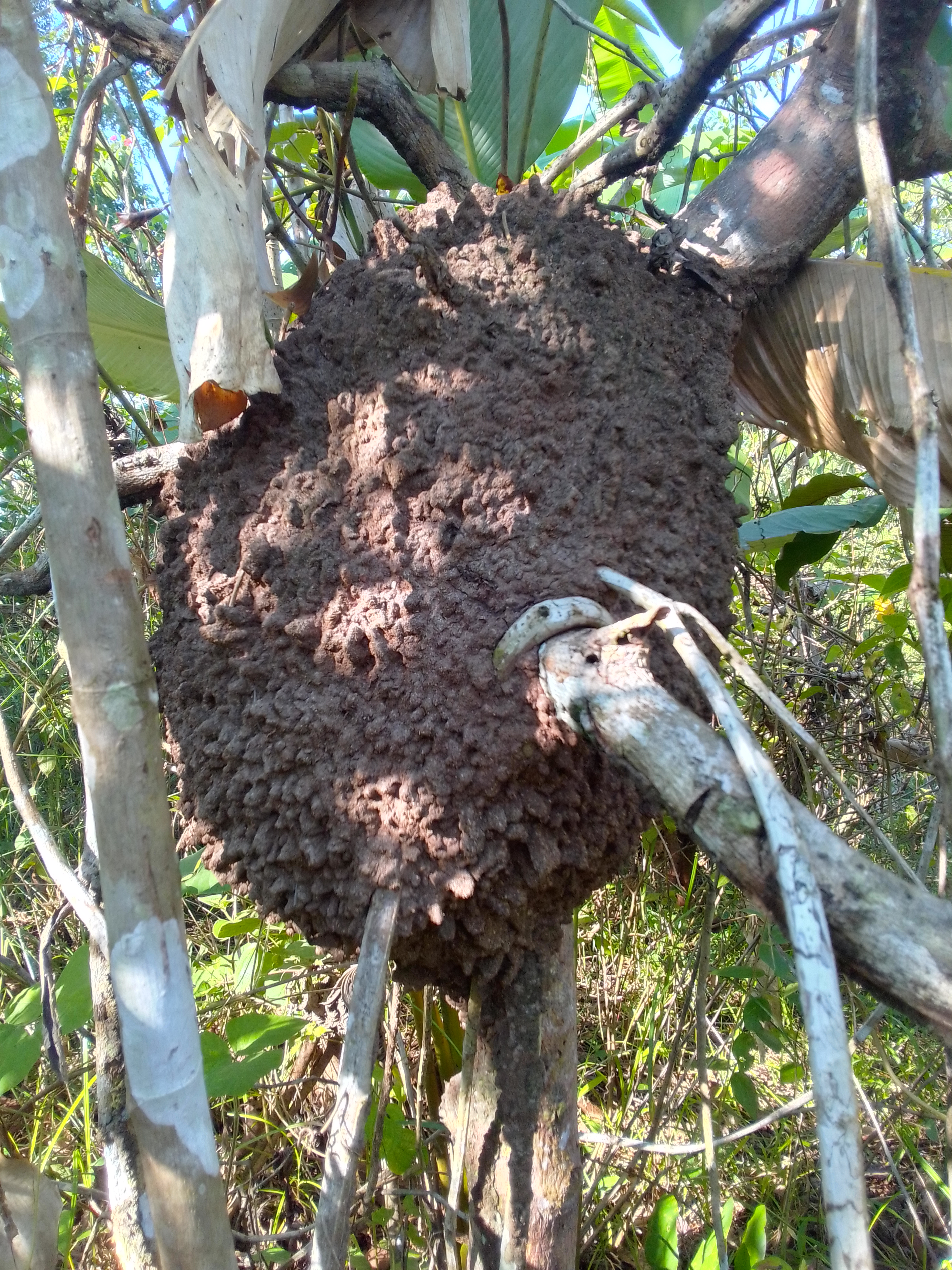 Comejen